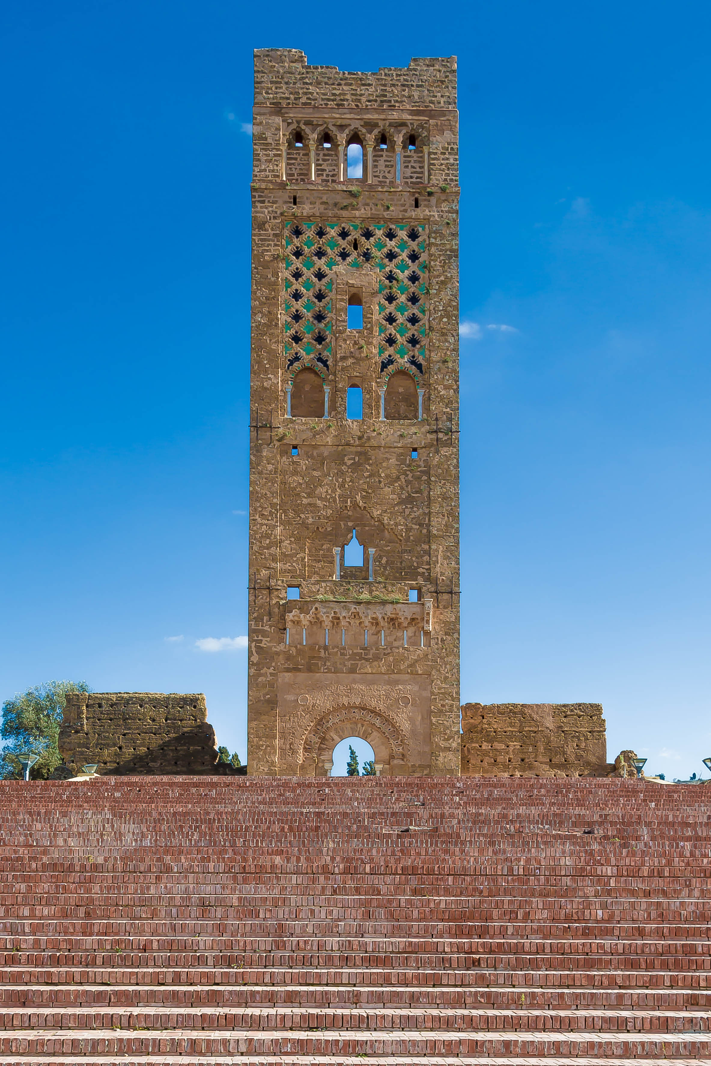 El Mahalla El Mansourah, Tlemcen, Algérie